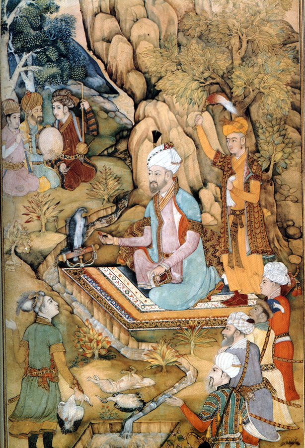 Babur, der Gründer des Mogulreiches (* 1483/ † 1530), Darstellung von ca. 1605; Museum für Islamische Kunst (Berlin), Inv.-Nr. I. 4593 fol. 49